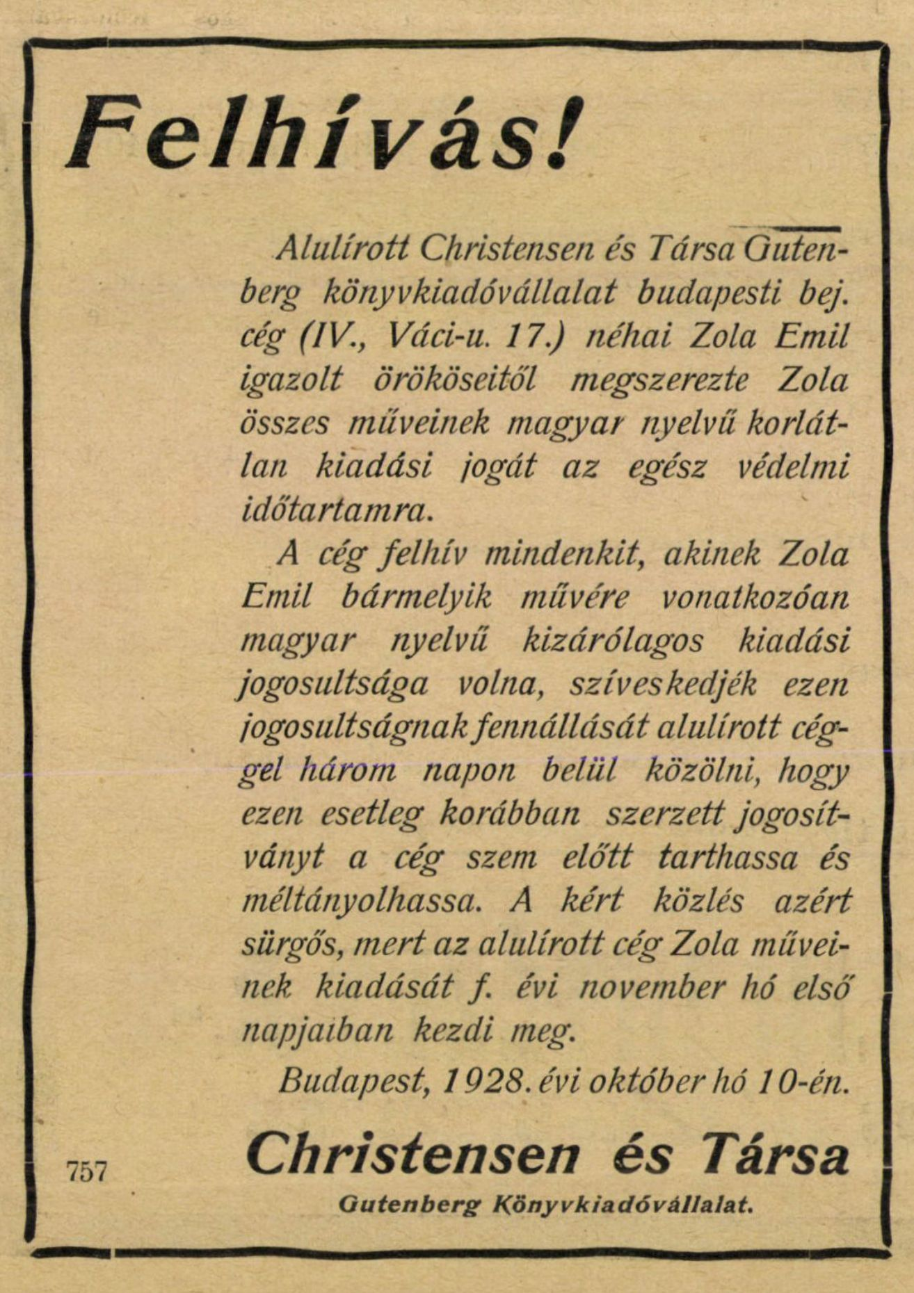 A Zola összes művei egy magyar könyvsorozat volt, amely Émile Zola műveit díszes kötéssel és bevezető tanulmányokkal ellátva jelentette meg 1929–1932 között 32 kötetben.